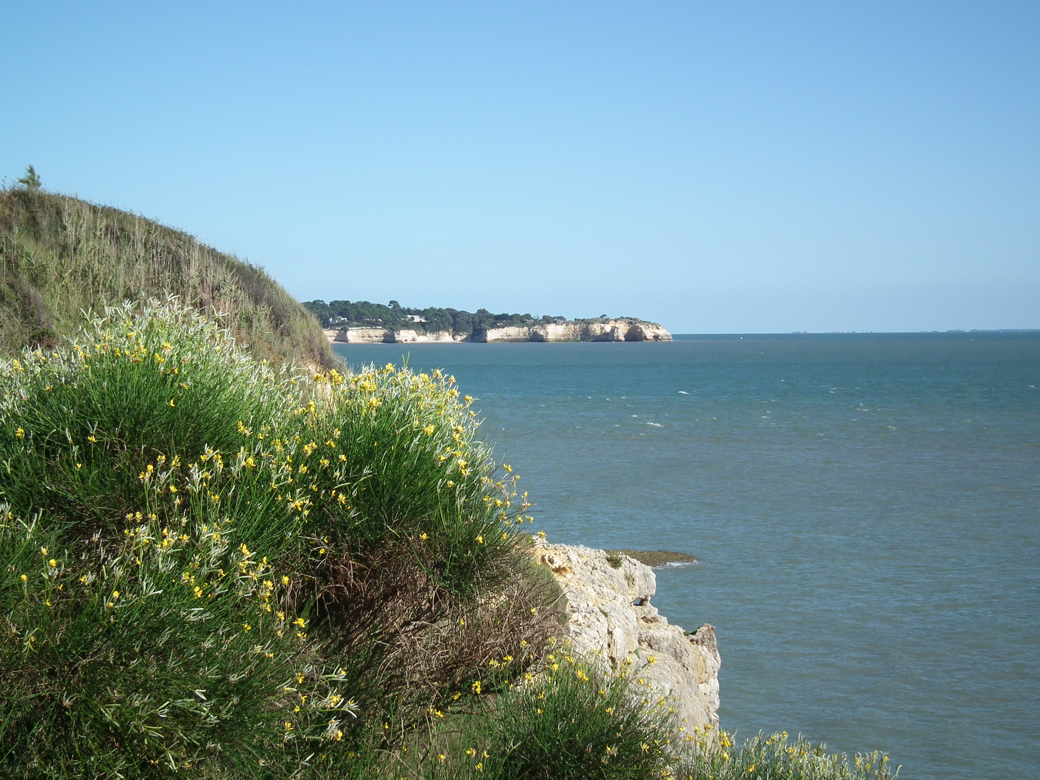 La côte à Vallières (Saint-Georges-de-Didonne)